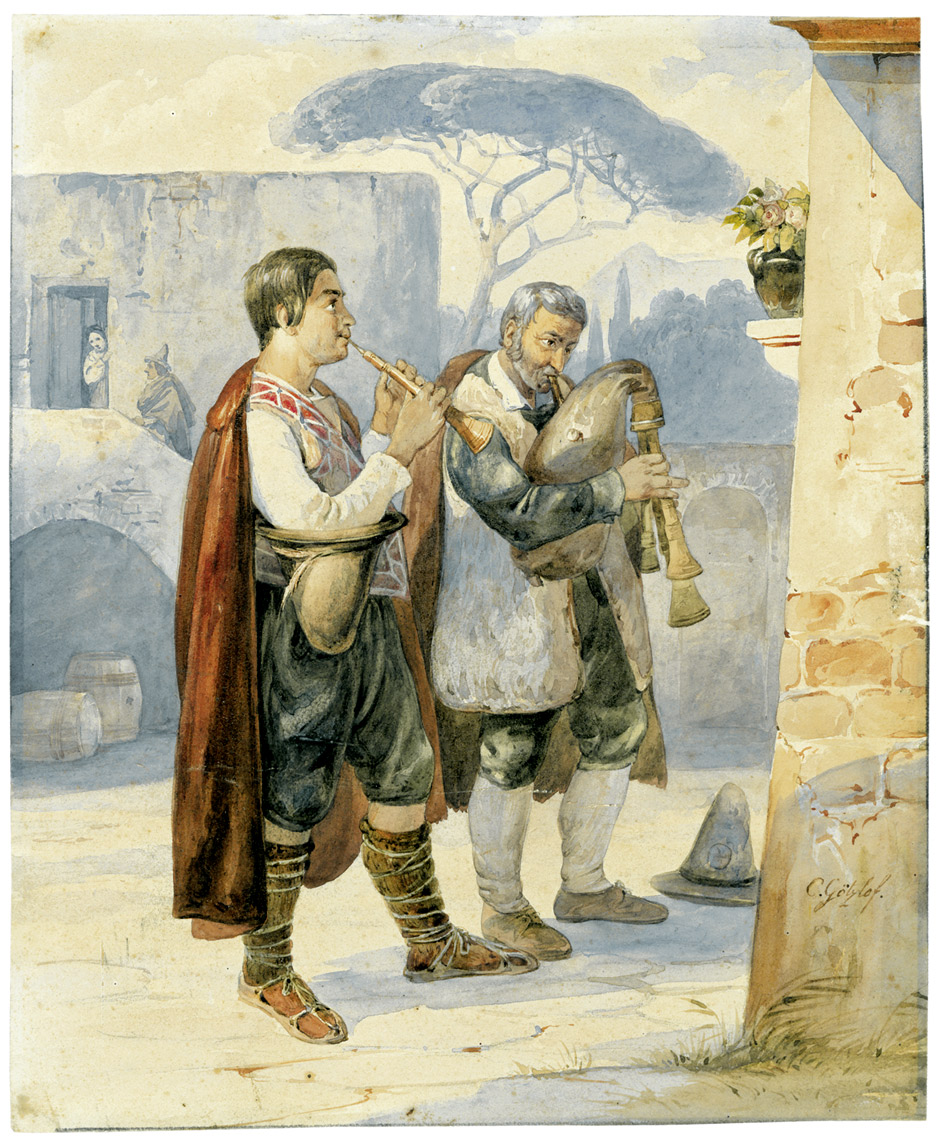 Zwei Pifferari, vor einem Andachtsbild musizierend. Aquarell auf Velin. 26,3 x 21,6 cm. Unten rechts auf der Mauer in brauner Feder signiert "C. Götzloff". Um 1828.